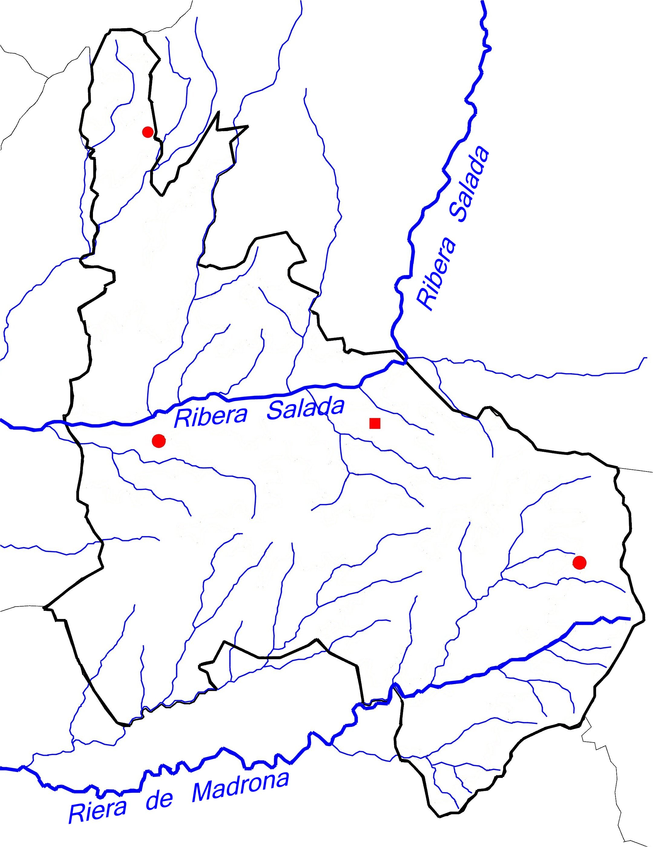 Mapa hidrogàfic del municipi de Castellar de la Ribera, al Solsonès.